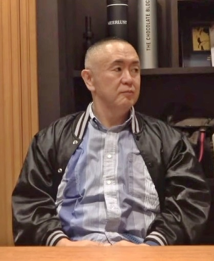 高木豊のYouTube動画に出演する松村邦洋